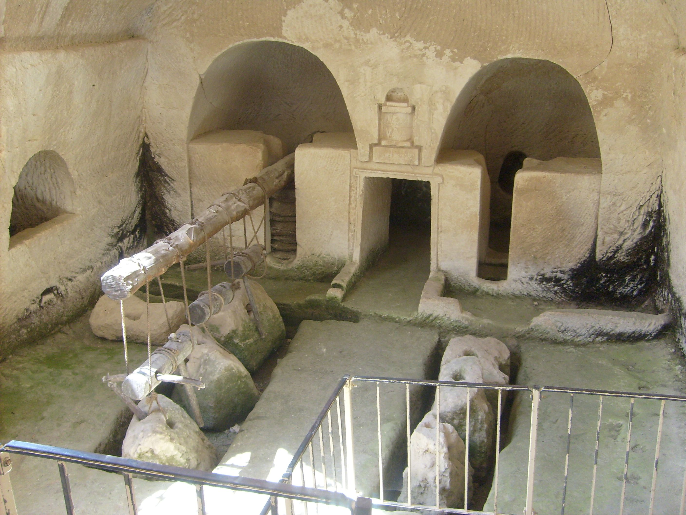 מערת בית בד במראשה